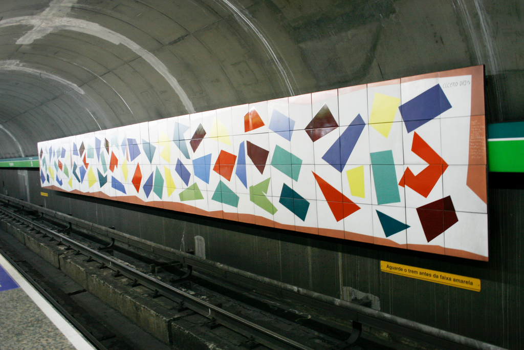 Estação de Metrô Brigadeiro - Plataforma no sentido Ana Rosa.